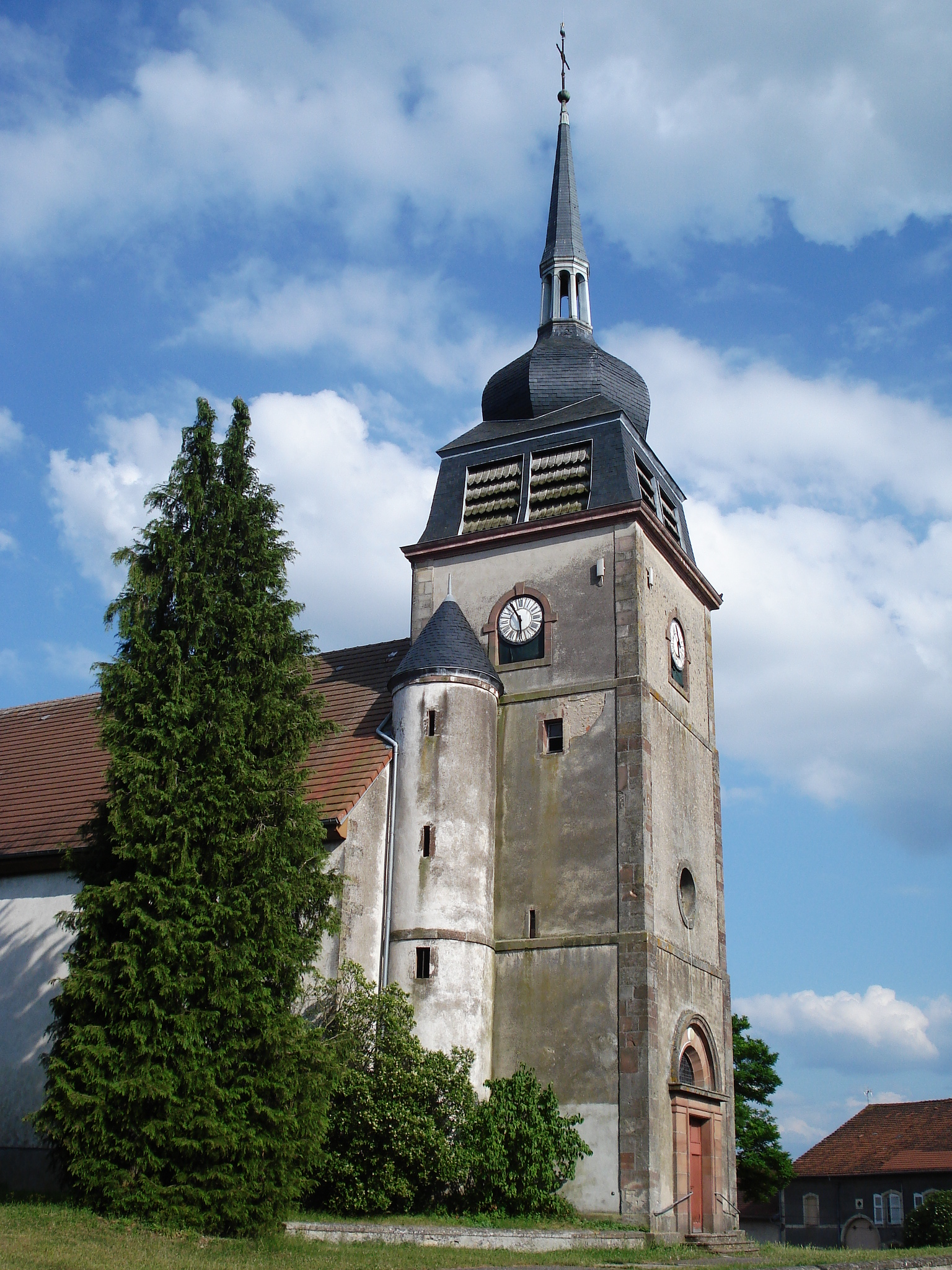 Inaugurée en 1733, l’église comporte une nef de style grange mais se remarque surtout par son clocher à bulbe et à tourelle dû à l’architecte Philibert originaire de Suisse dont l’influence se retrouve même si le clocher actuel a été reconstruit après la Seconde Guerre mondiale.